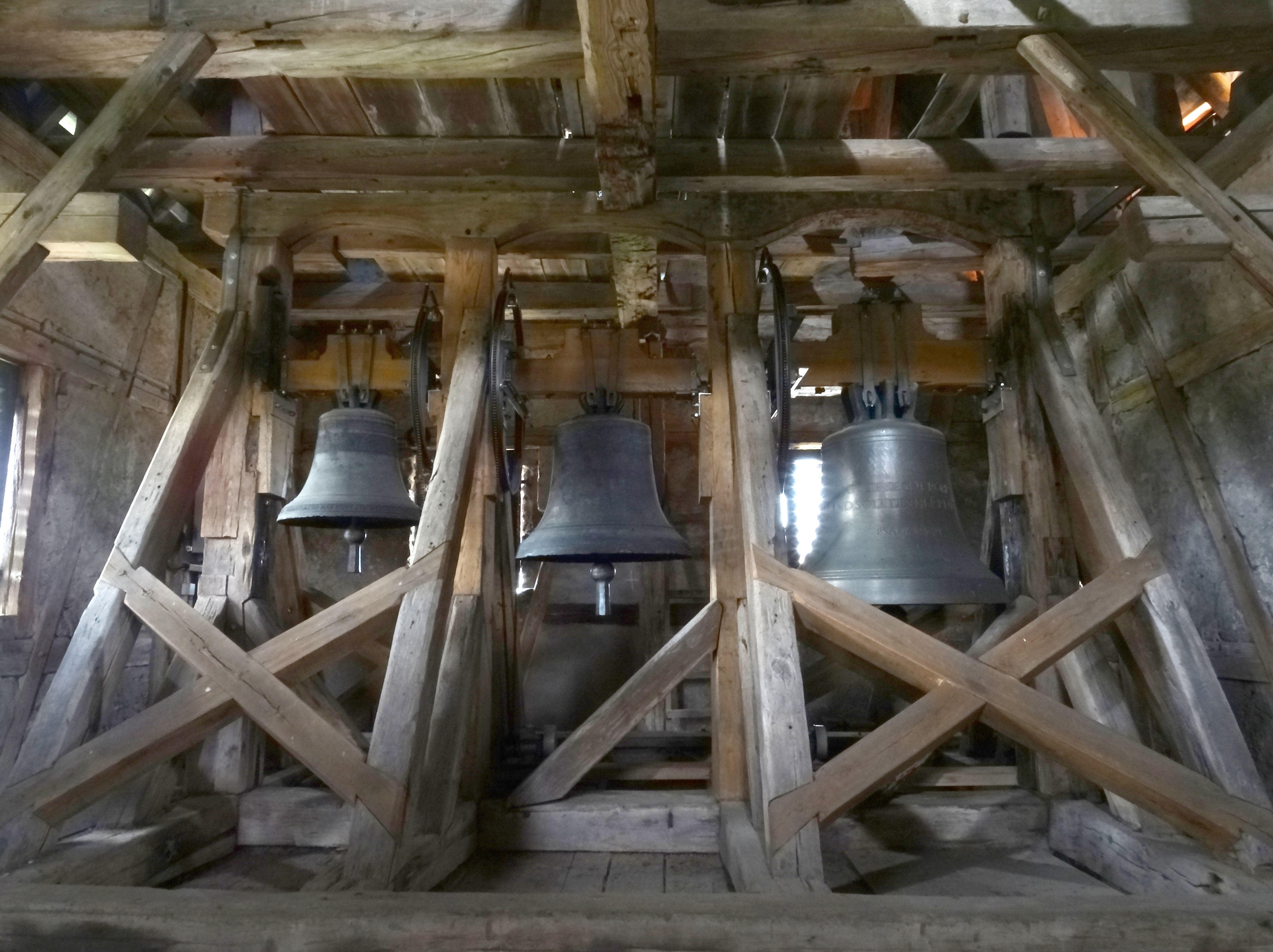 Glockenspiel